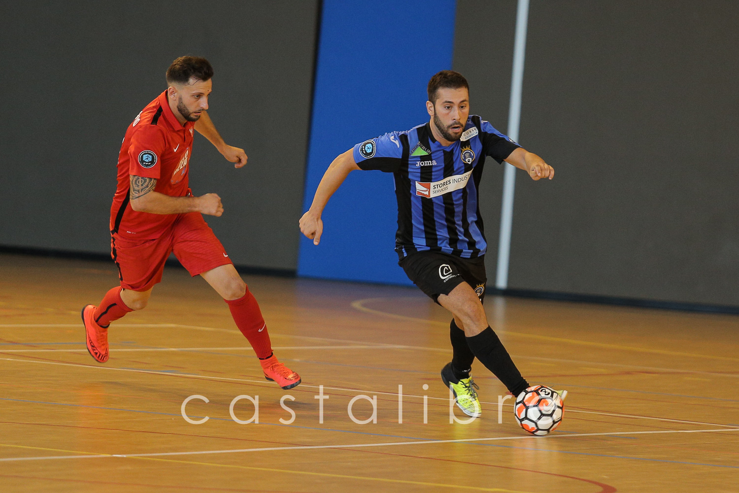 Primera División Francia